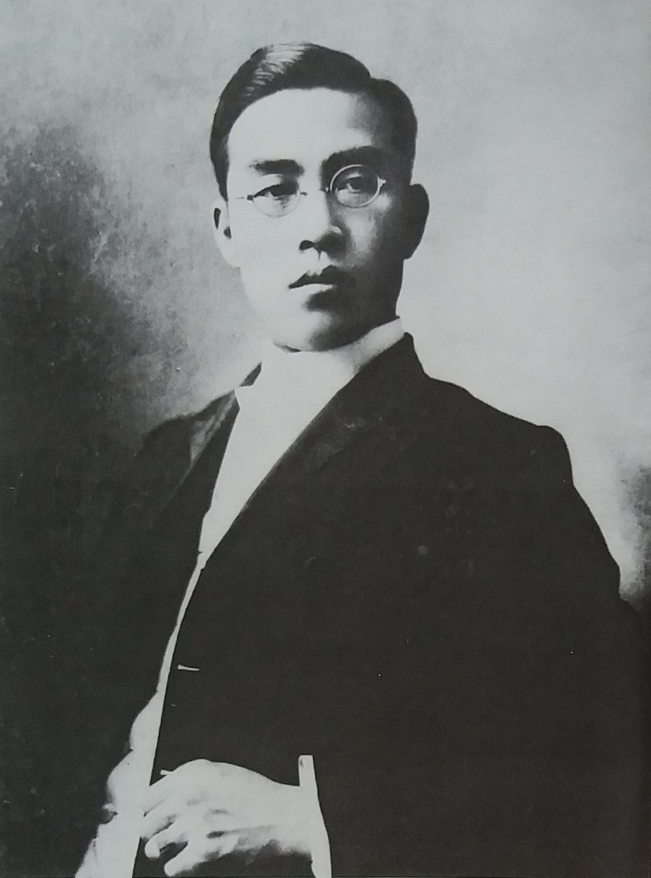 金焰的父亲金弼淳